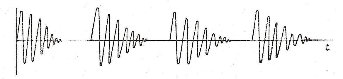 ondes amorties ; radiotélégraphique ; crée par un émetteur à ondes amorties. On désigne le « type d'ondes amorties » par la lettre B : Ondes composées de séries successives d'oscillations dont l'amplitude, après avoir atteint un maximum, diminue graduellement, les trains d'ondes étant manipules suivant un code télégraphique. Procède abandonne à présent.